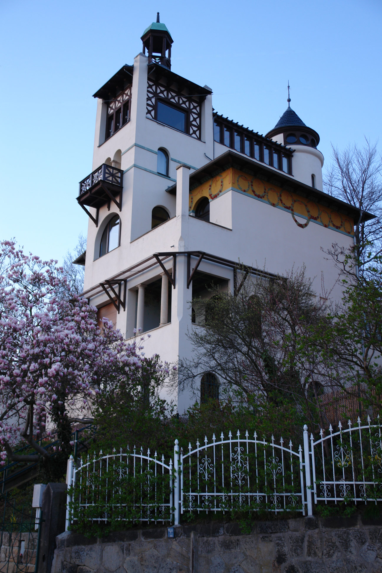 Villa Weißer Hirsch Herrmann-Prell-Straße